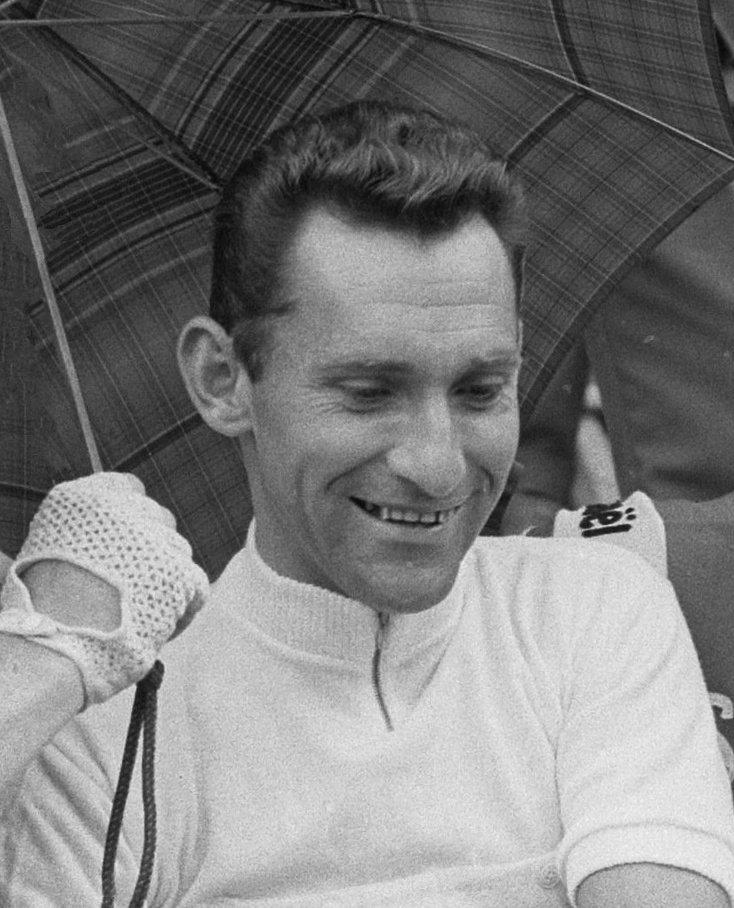 Nationaal Archief Beschrijving: Voor de start. Jean Stablinski Datum 27 juni 1963 Bestanddeelnummer 915-3084 Vervaardiger: Anefo / Harry Pot (1929–1996) DescriptionDutch photographer and cinematographerDate of birth/death 1929 1996Work location Amsterdam, BentveldAuthority control : Q27877051 VIAF: 284191334 ISNI: 0000 0003 9050 874X Koninklijke: 073478326 creator QS:P170,Q27877051 URL: Voor meer informatie over het Nationaal Archief: Voor meer foto's uit deze en andere collecties, bezoek onze Beeldbank:, U kunt ons helpen onze kennis van de fotocollecties te verrijken door tags en commentaren toe te voegen. Herkent u mensen of locaties of heeft u een bijzonder verhaal te vertellen bij één van de foto's, laat dan een reactie achter (als u ingelogd bent bij Flickr) of stuur een mailtje naar